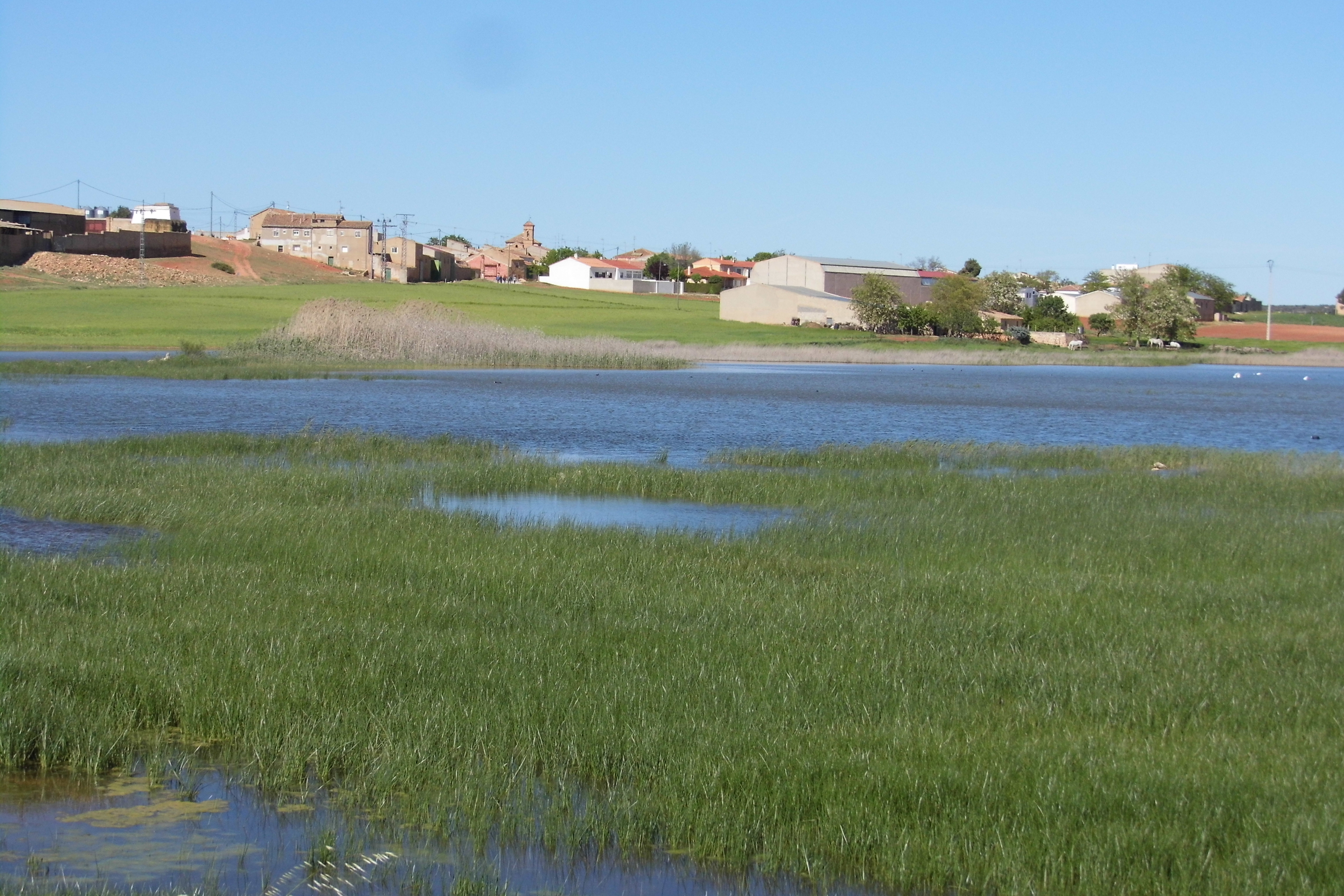 Lagunas saladas de Pétrola y Salobrejo y complejo lagunar de Corral-Rubio This is a photography of a Site of Community Importance in Spain with the ID: ES4210004. Natura2000 entry, EEA entry